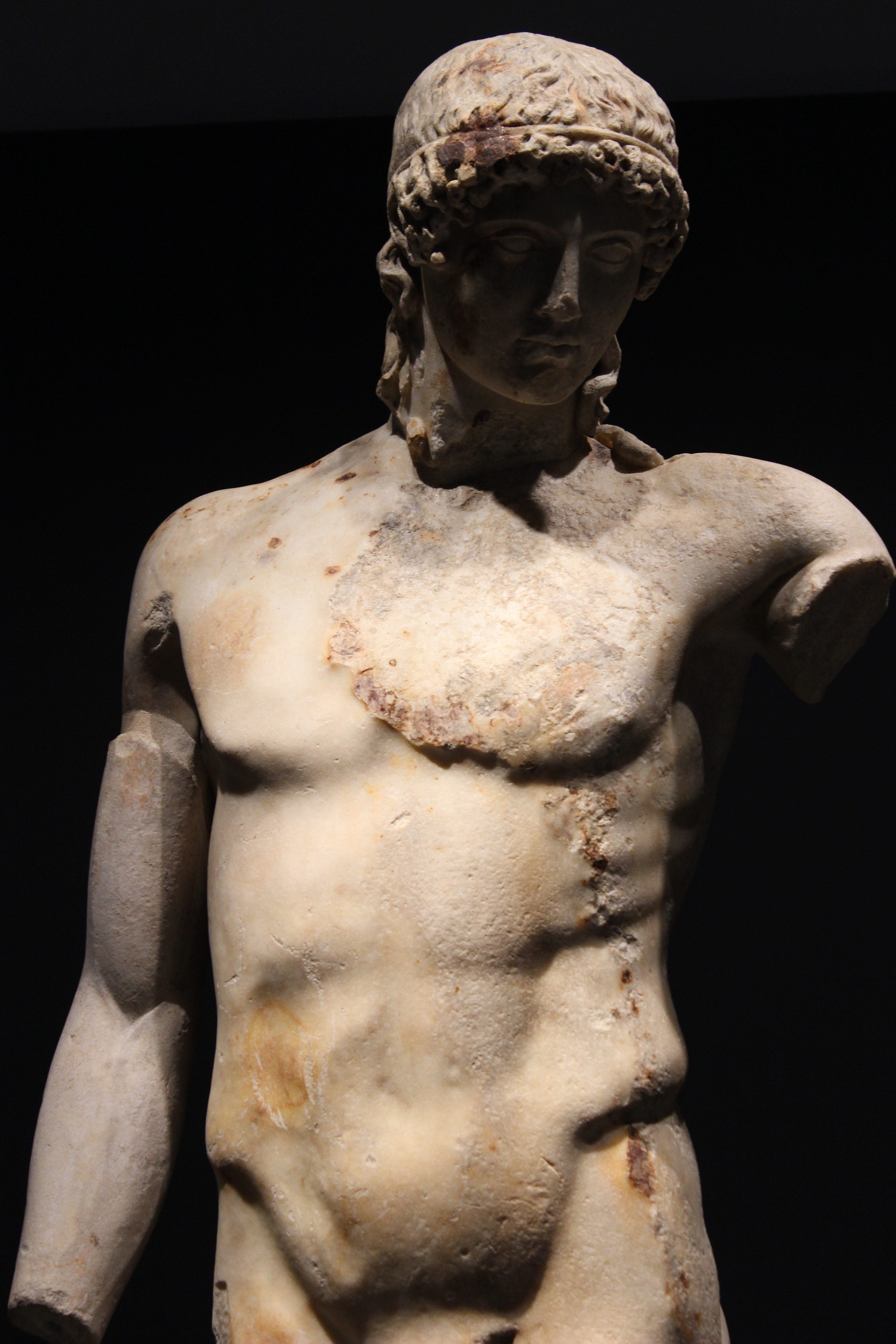 Apolo del Tíber. Roma.